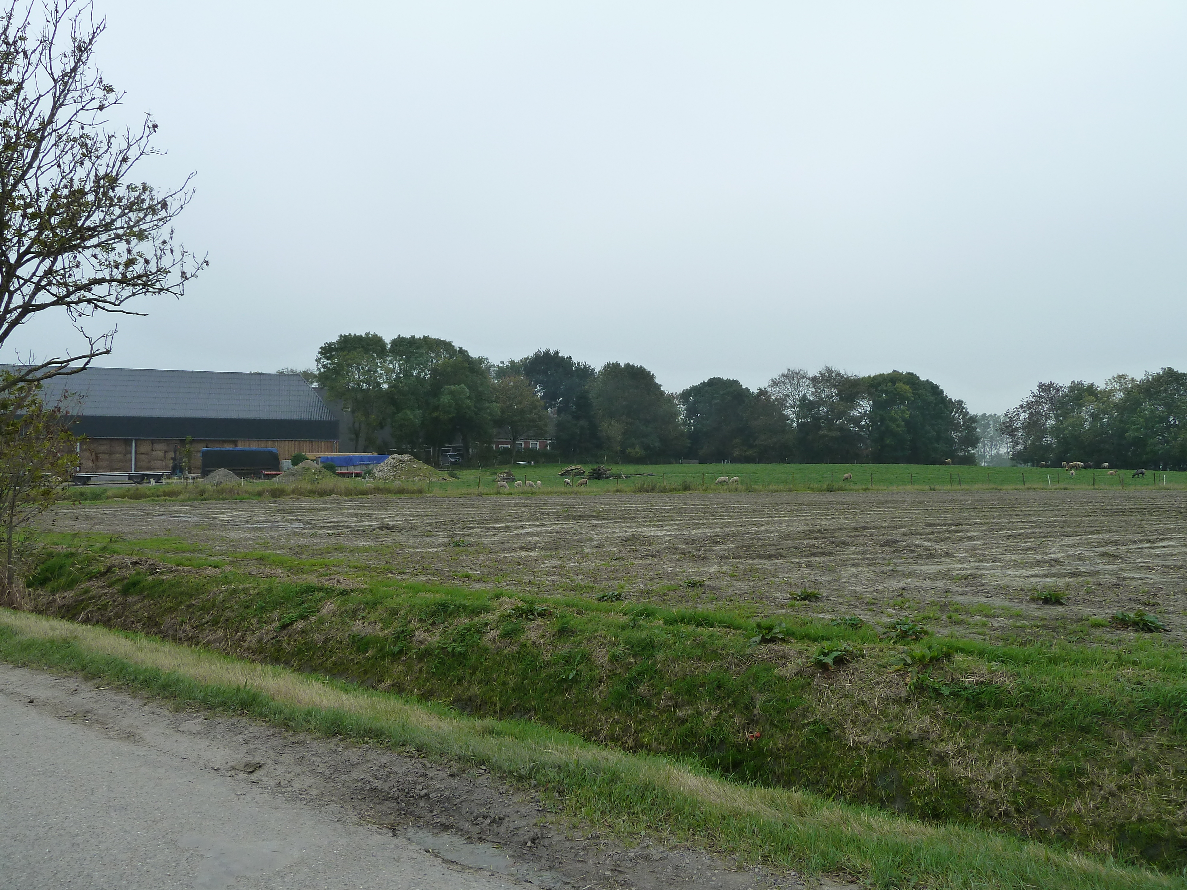 Aalsum.